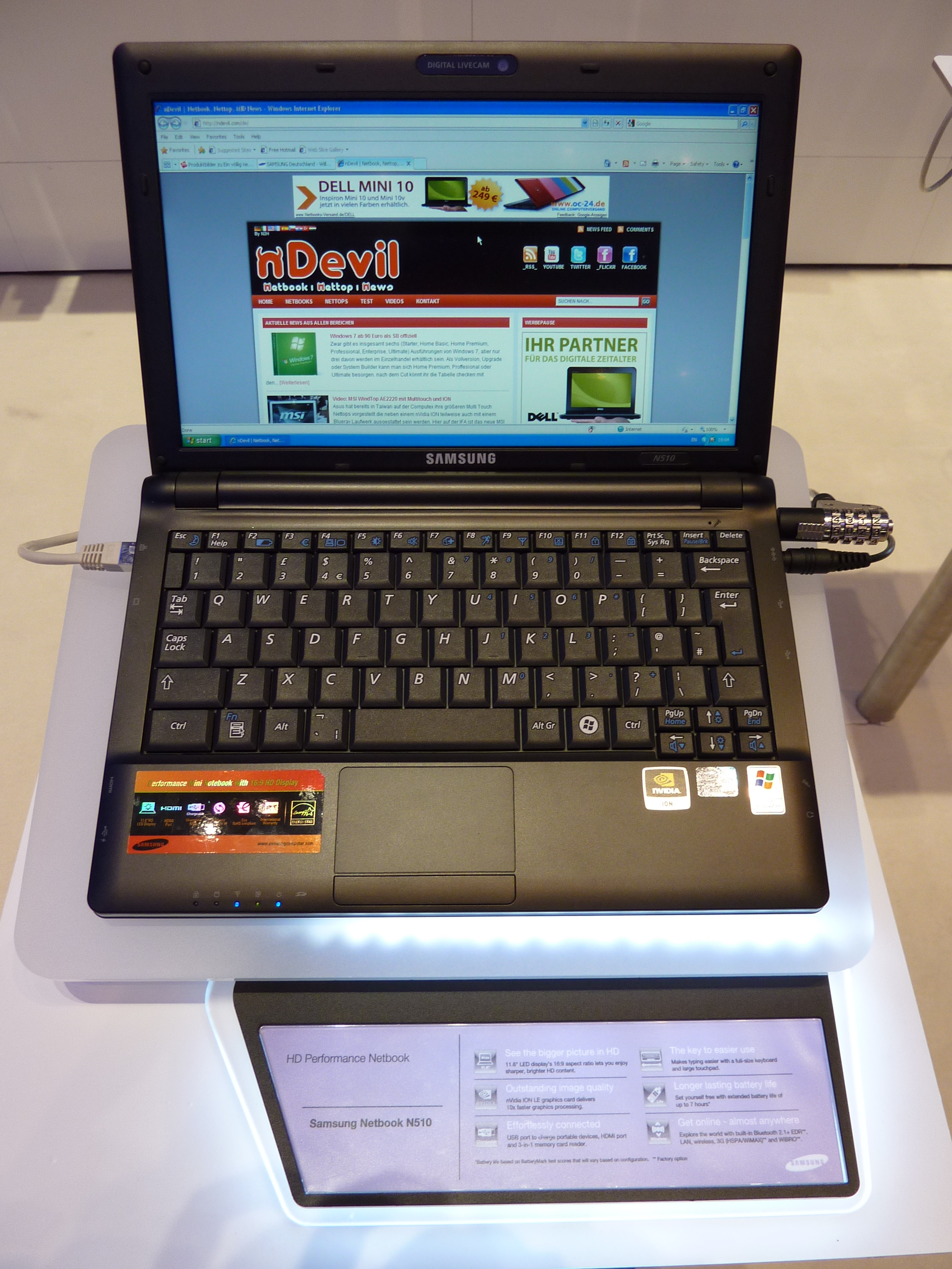 11.6", Intel Atom N280, Nvidia Ion